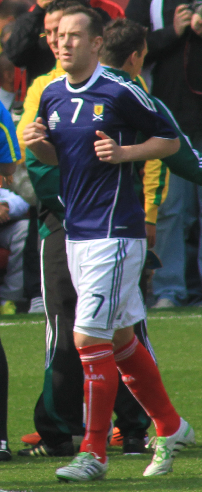 Brazil v Scotland 32